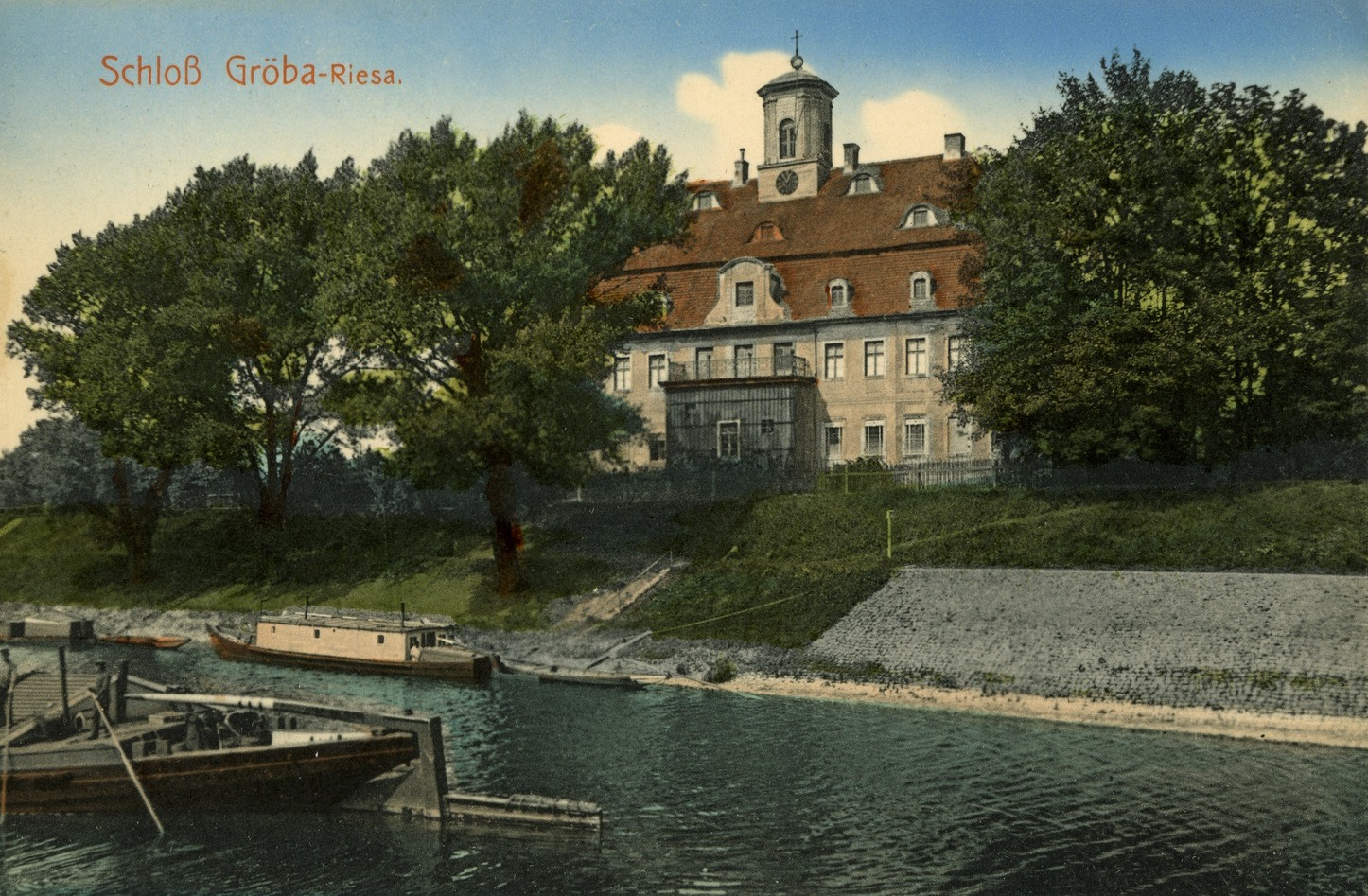 Riesa; Schloß Gröba This postcard is from publisher Brück & Sohn in Meißen ( postcard has a unique number 09527 and is available in a higher resolution at the publisher. This images was uploaded in a cooperation project between Wikipedians and the publisher.